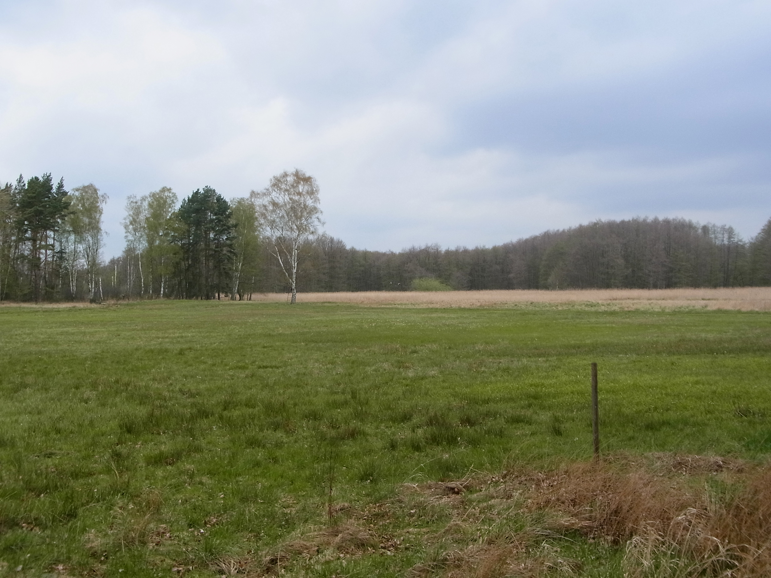 Waldrand am Schapenbruch, Braunschweig